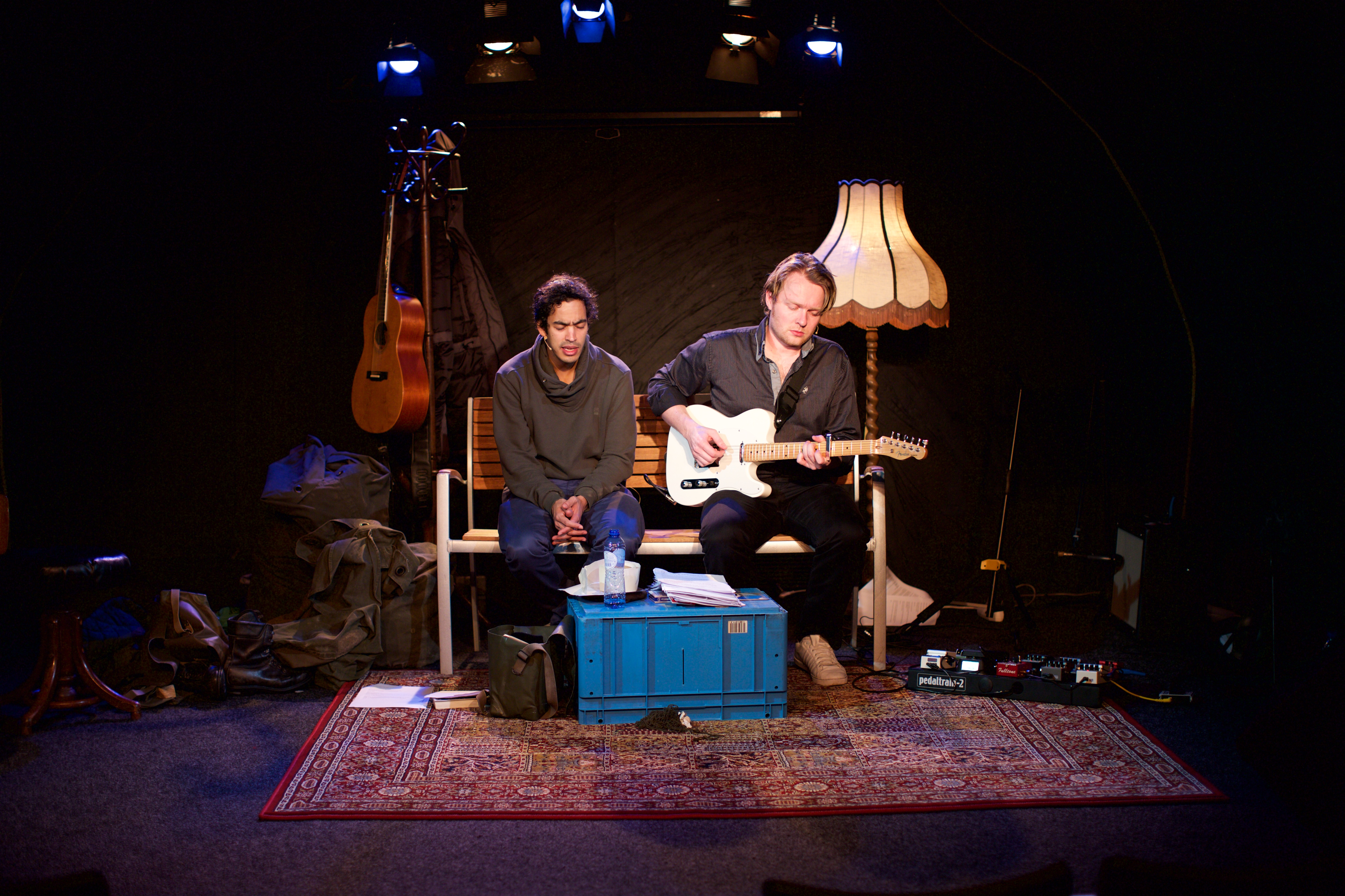 Marcel Harteveld en Johan Fretz tijdens een try-out in februari 2015 in het Werftheater in Utrecht.